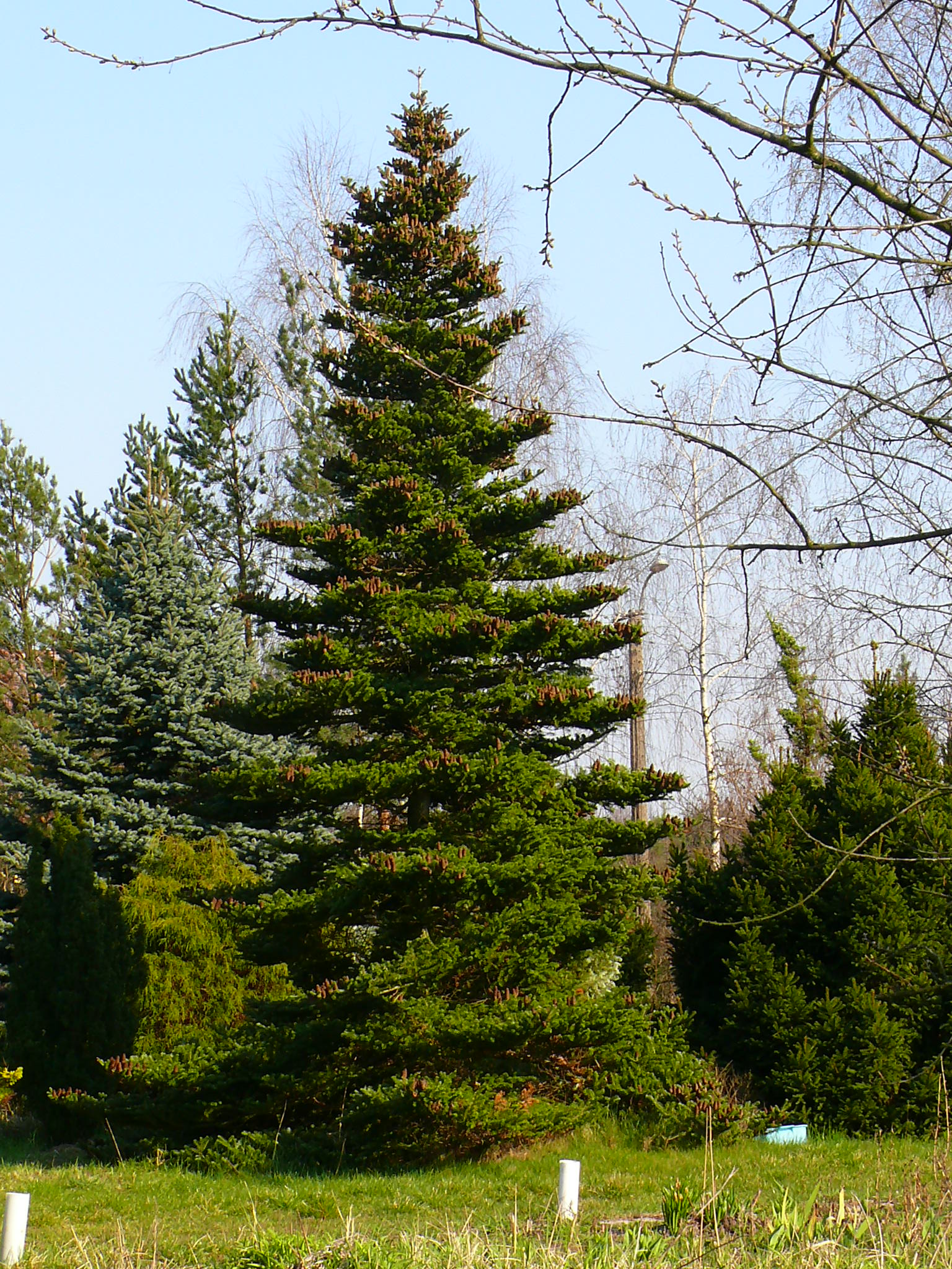 Abies koreana